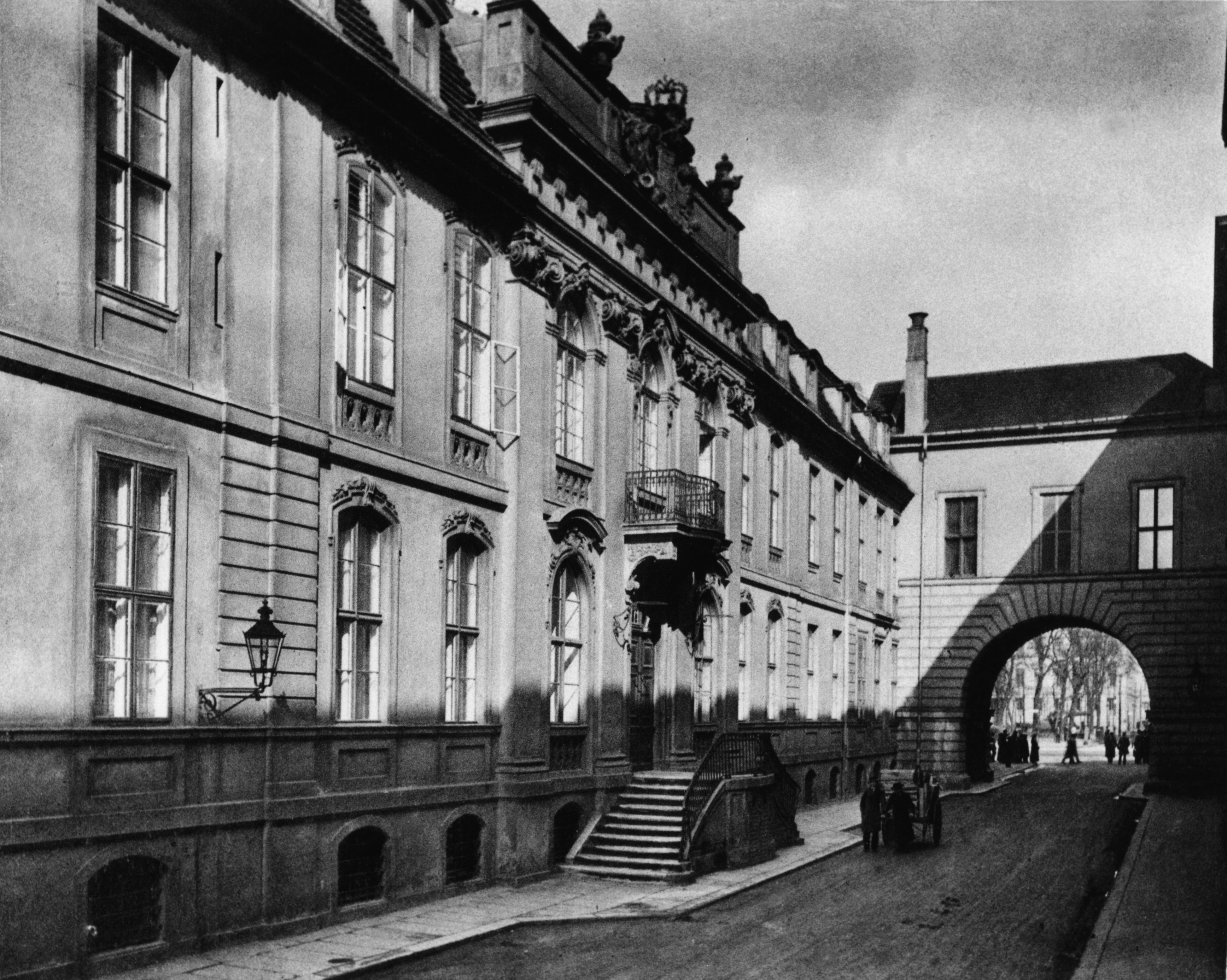 Ab Mai 1938 wurden die Büros des Museums im Prinzessinnenpalais untergebracht, auch ein paar Ausstellungsräume befanden sich dort. Werkstätten, Studiensammlungen etc. waren hingegen in der Splittgerbergasse 3 untergebracht. GLAM-on-Tour: Wiki goes MEK! 2.0 Wikipedianer fotografierten vom 16. bis 18. November 2018 im Museum Europäischer Kulturen. This photo was taken during a project supported by WMDE. Gefördert von / Supported by: Wikimedia Deutschland, Museum Europäischer Kulturen